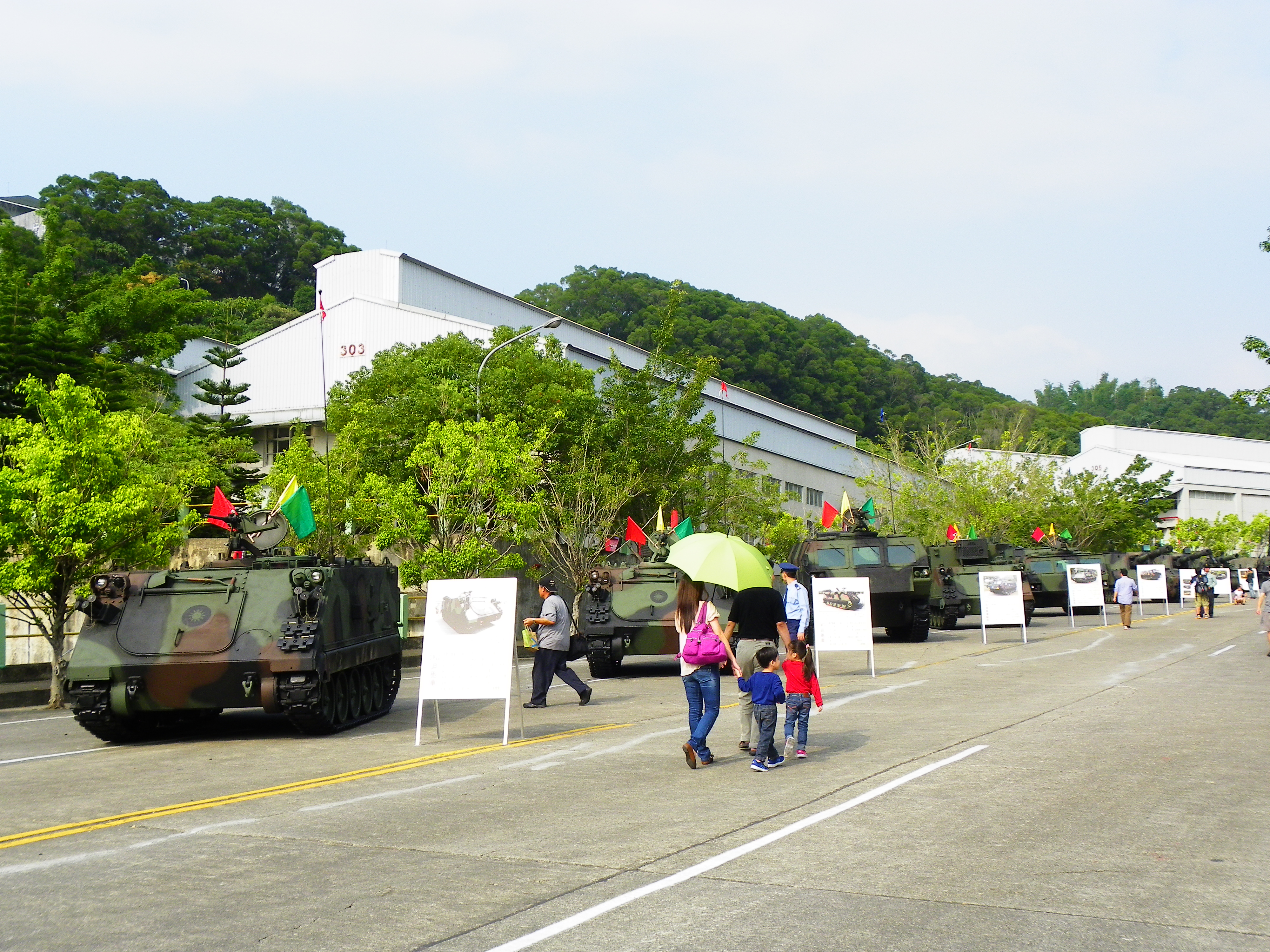 2012年兵整中心營區開放活動，岳崗路展示的中華民國陸軍裝甲運兵車與自走砲群。前起：CM-22迫砲車、CM-23迫砲車、CM-24彈藥車、CM-26指揮車、CM-27曳砲車、M109A2自走砲、M109A5自走砲、M110A2自走砲。